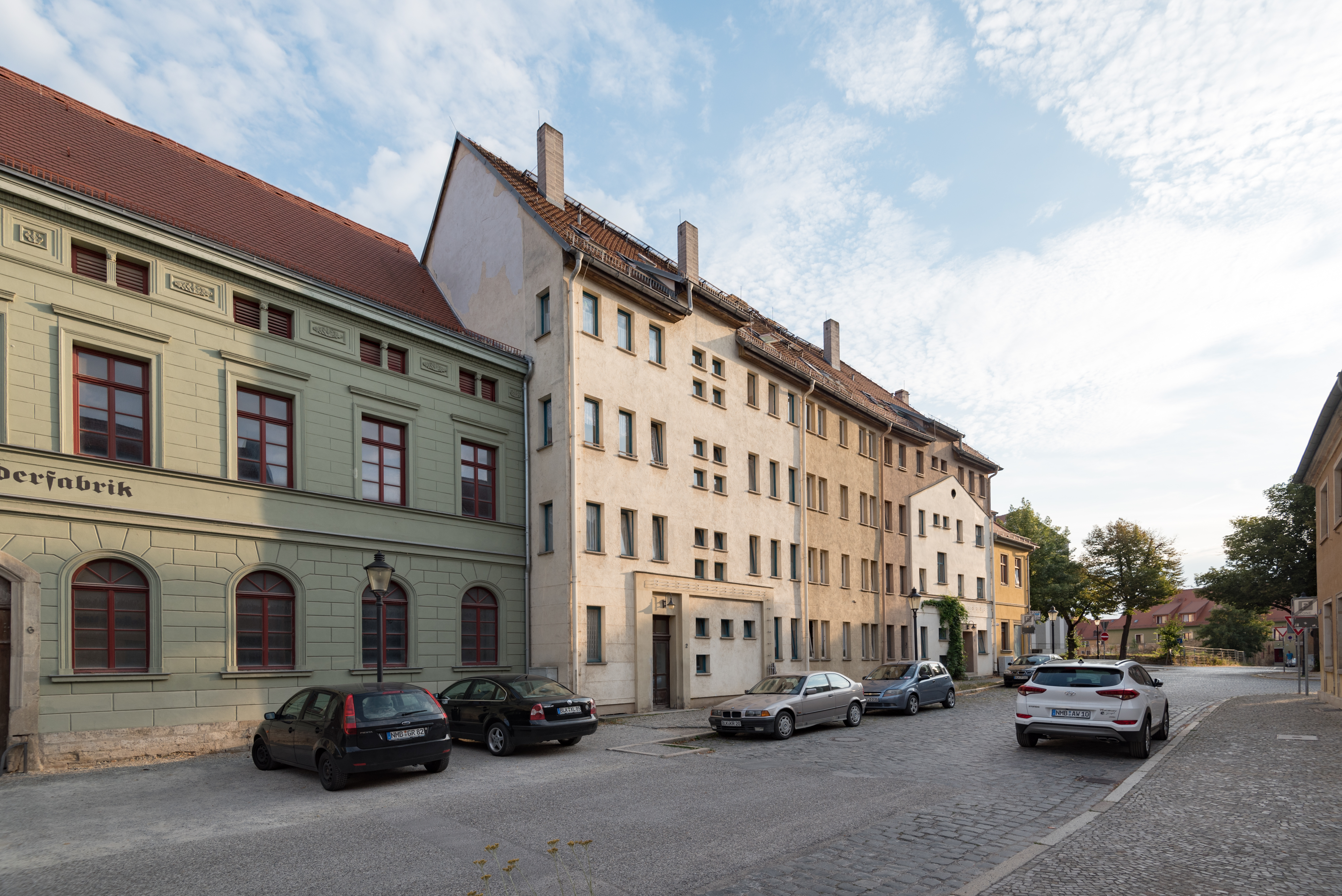 Naumburg (Saale), Reußenplatz 6, 2, 1